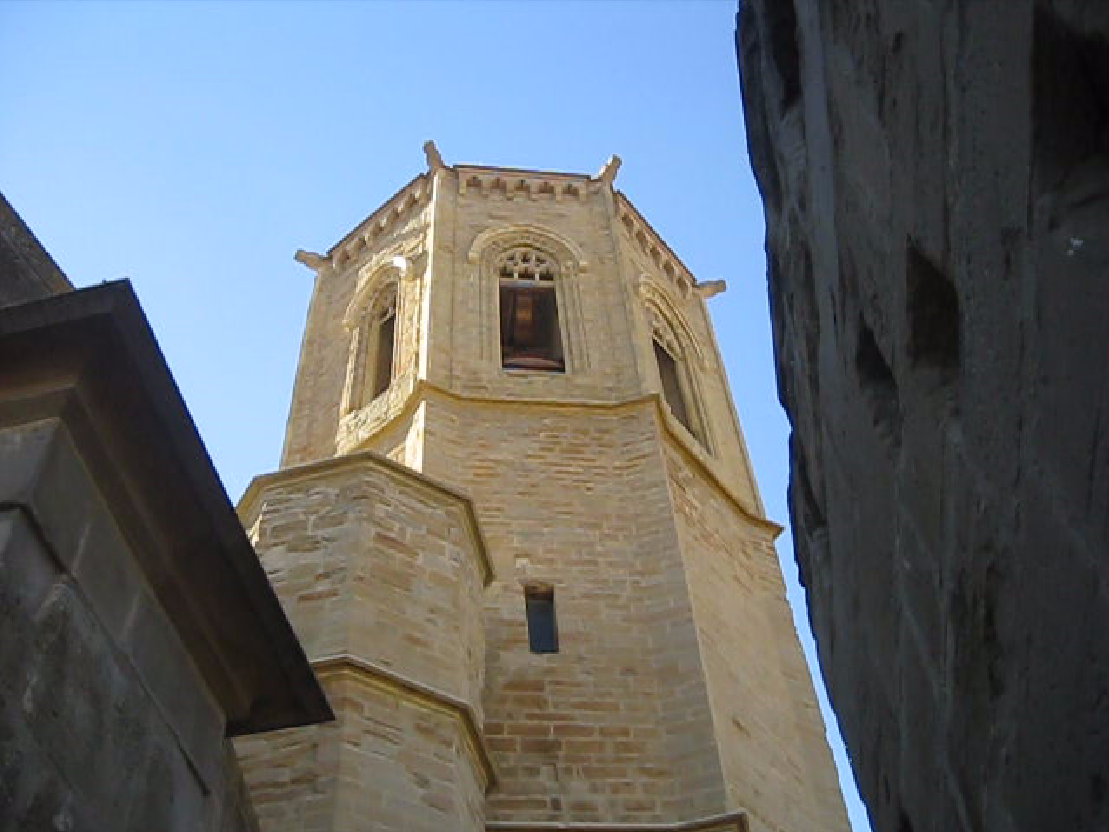 Perdó per la calitat de la imatge, es molt dolenta... :(